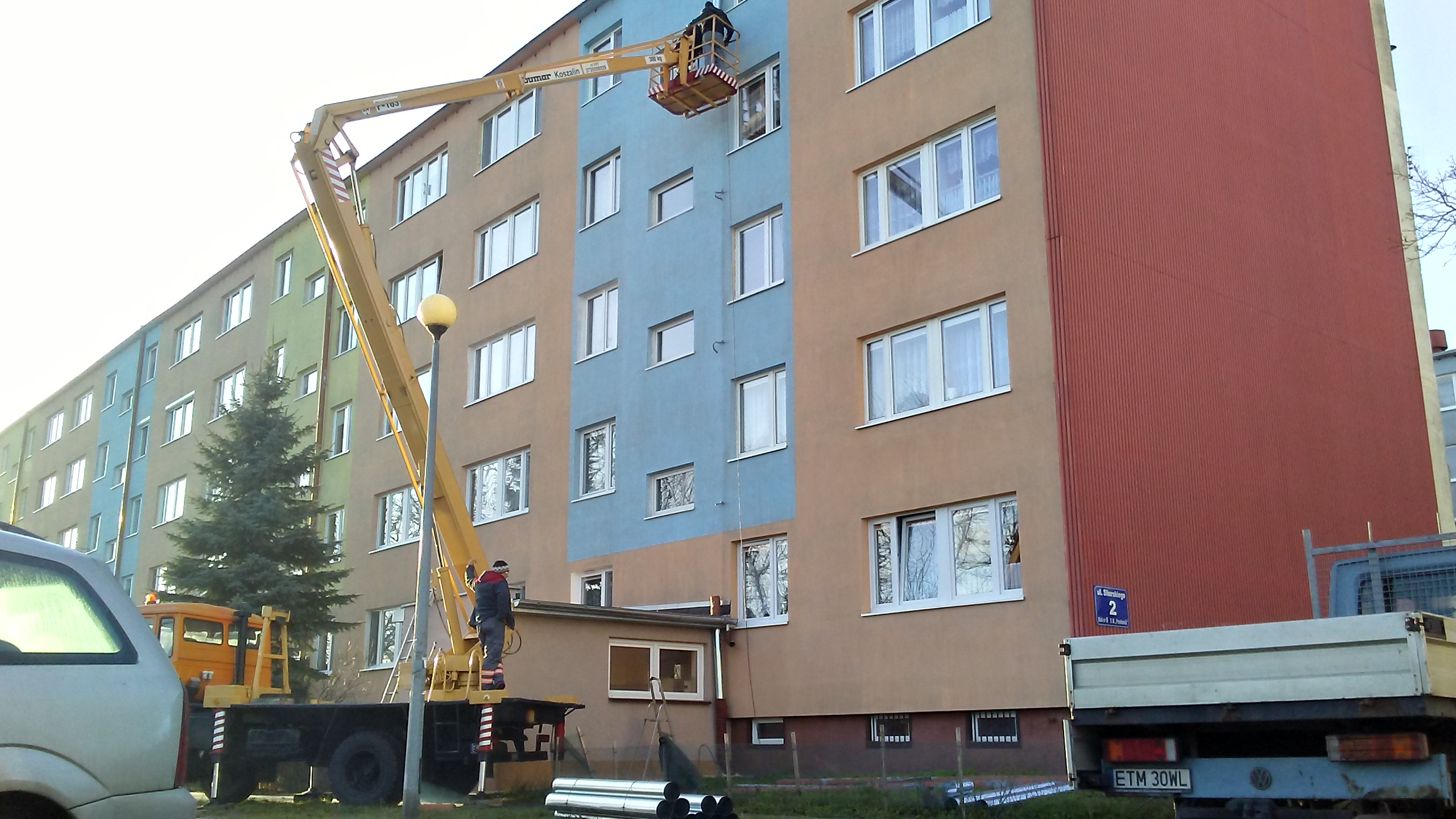 Tomaszów Mazowiecki w województwie łódzkim, PL, EU. Wymienia rynien na Osiedlu Hubala I. CC0